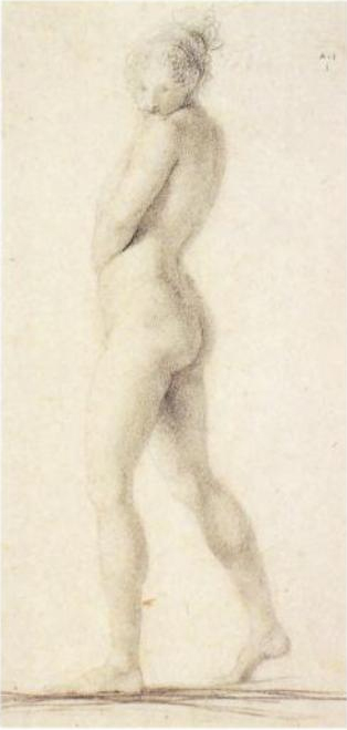 Nu feminino, carvão e lápis